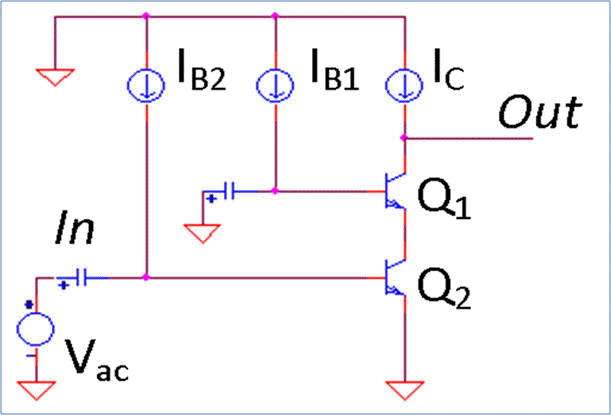 Idealized BJT cascode amplifier